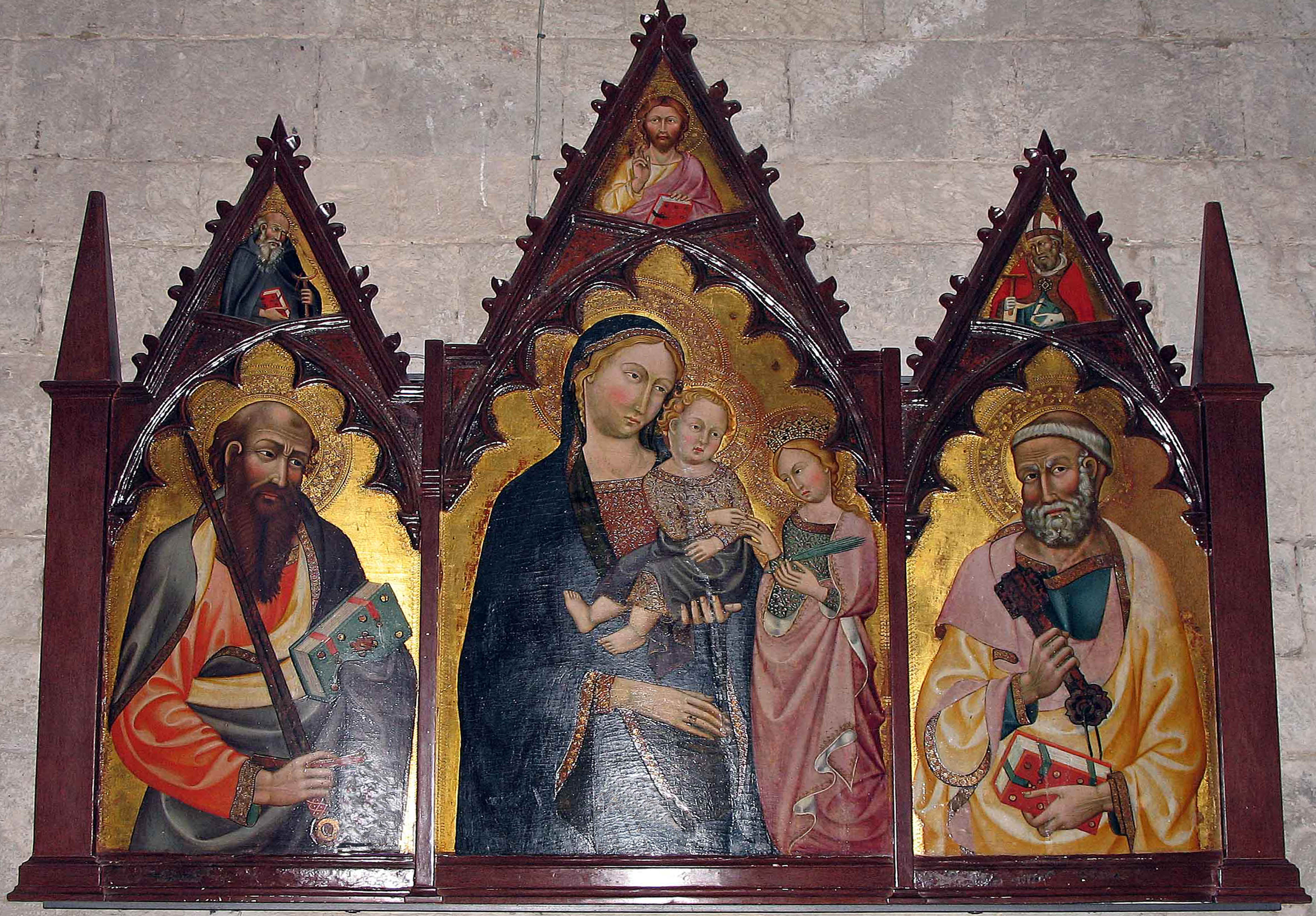 Dipinto del Maestro di Panzano Pieve di San Leolino a Panzano